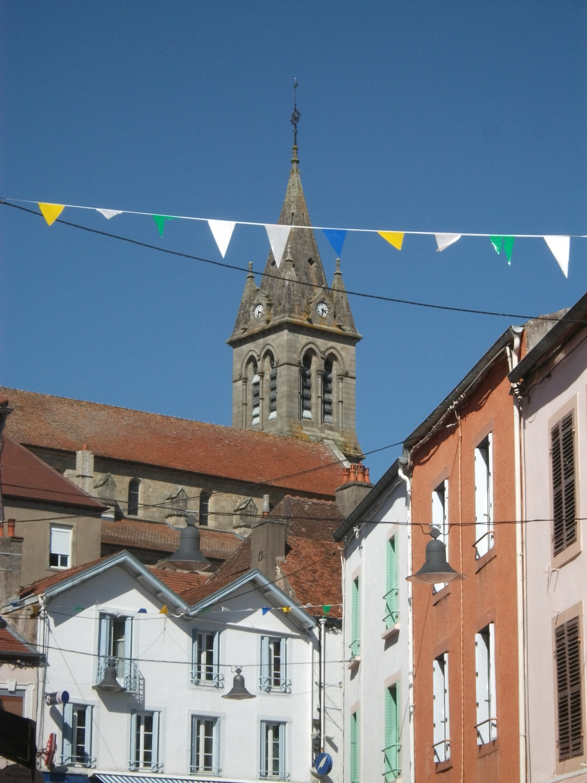 L'église vue depuis le centre ville de Bourbonne les bains.